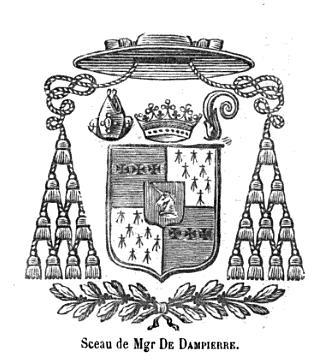 Blason de Charles-Antoine-Henri Duvalk de Dampierre, évêque de Clermont (1802-1833)